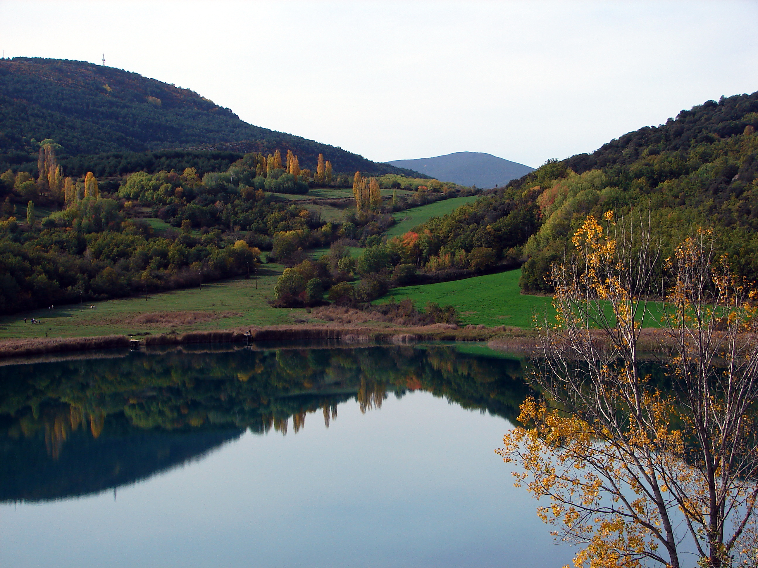 Estany de Montcortès (Pallars Sobirà), 29 d'Octubre de 2006.